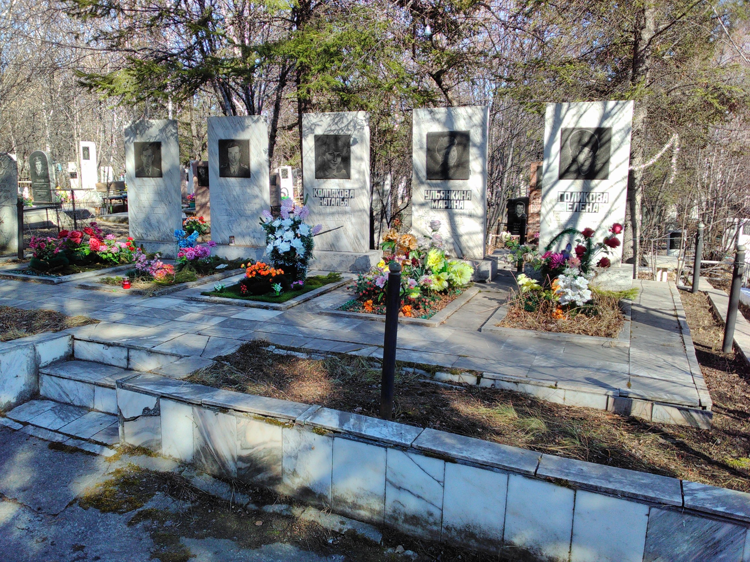 Памятники на могилах в шестом секторе с воинскими захоронениями на старом Бадалыкском кладбище города Красноярска (координаты N56°05'23,12" E92°55'22,27") пяти членов экипажа разбившегося у аэропорта Емельяново 23-го декабря 1984 года Ту-154-Б2 с бортовым номером СССР-85338 (второго пилота Белавина Юрия Петровича, бортинженера Ресницкого Андрея Васильевича и бортпроводниц Колпаковой Натальи Петровны, Ульянкиной Марины Степановны и Голиковой Елены Борисовны).